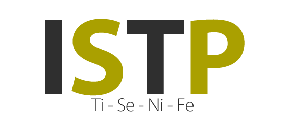 Logo MBTI ISTP.